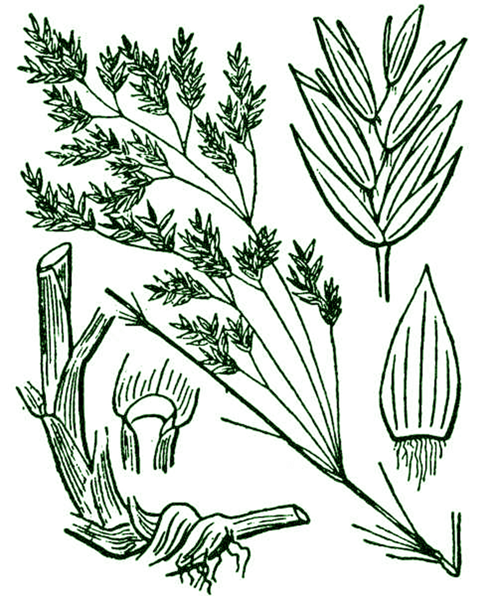 Paturin hybride